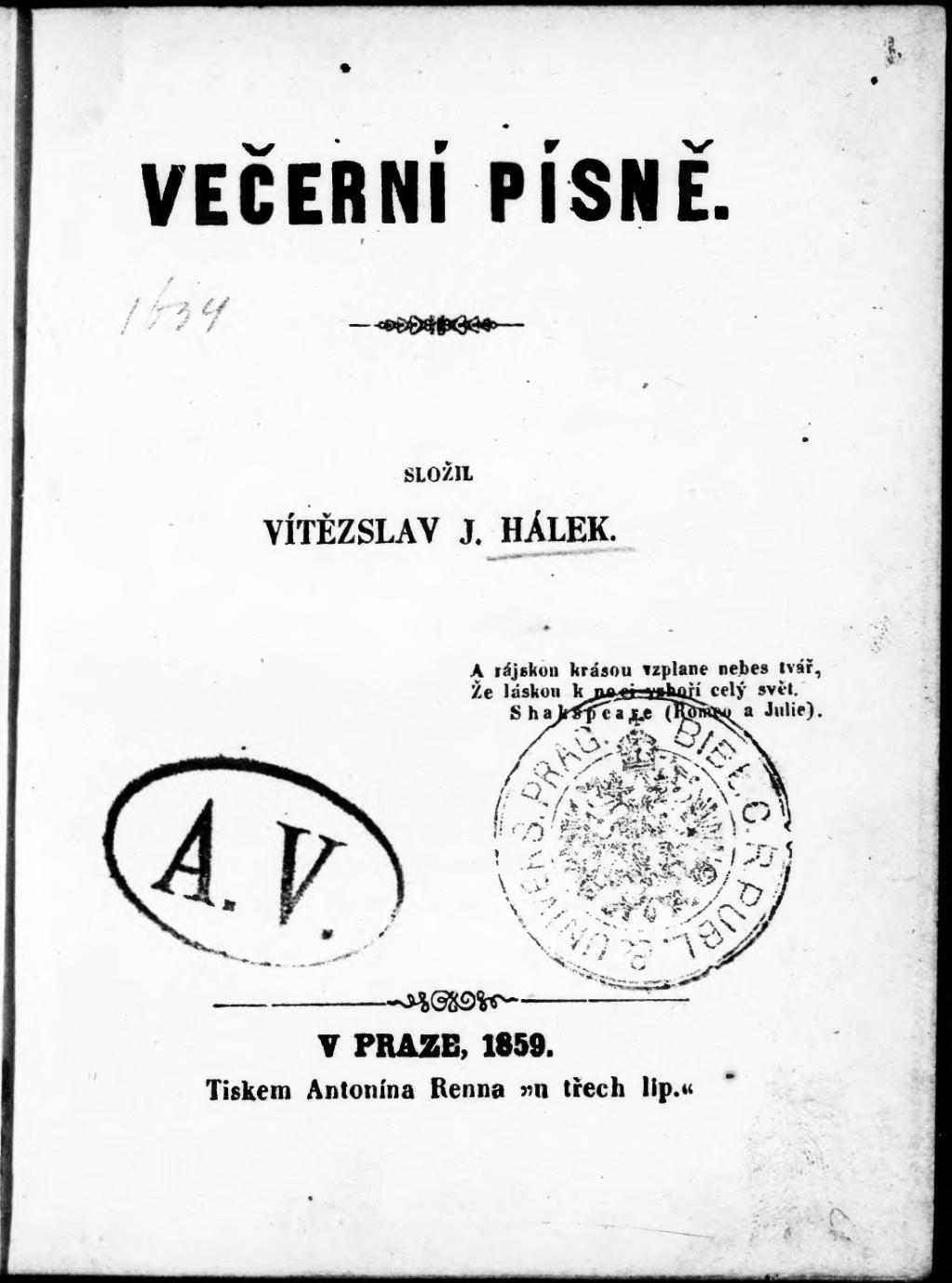 První vydání Hálkových Veřerních písní